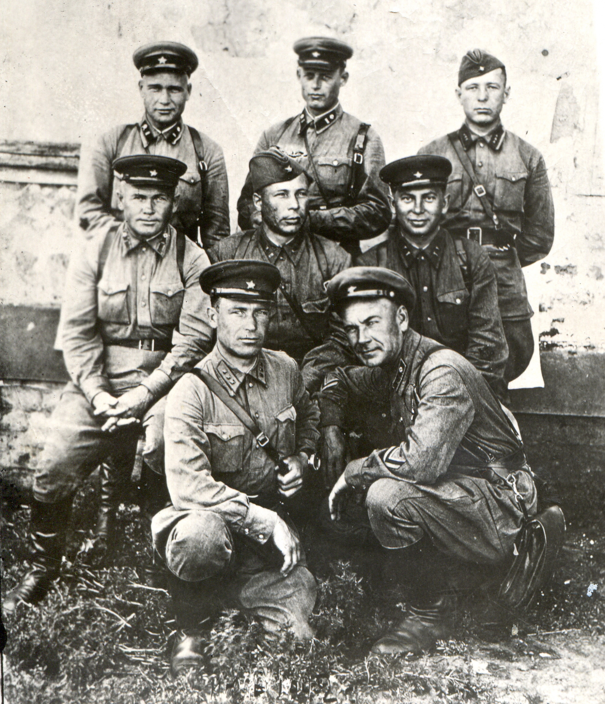 Офицеры 13-й мотострелковой дивизии внутренних войск НКВД в день перевода в РККА (дивизия переименована в 95-ю стрелковую). Район города Воронеж. Первый слева во втором ряду - пограничник, капитан Иван Кузьмич Калмыков, командир 1-го стрелкового батальона. Погиб в Сталинграде, в должности командира 241-го полка 95-й стрелковой дивизии.